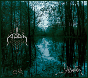 Cover des Albums Gezeiten